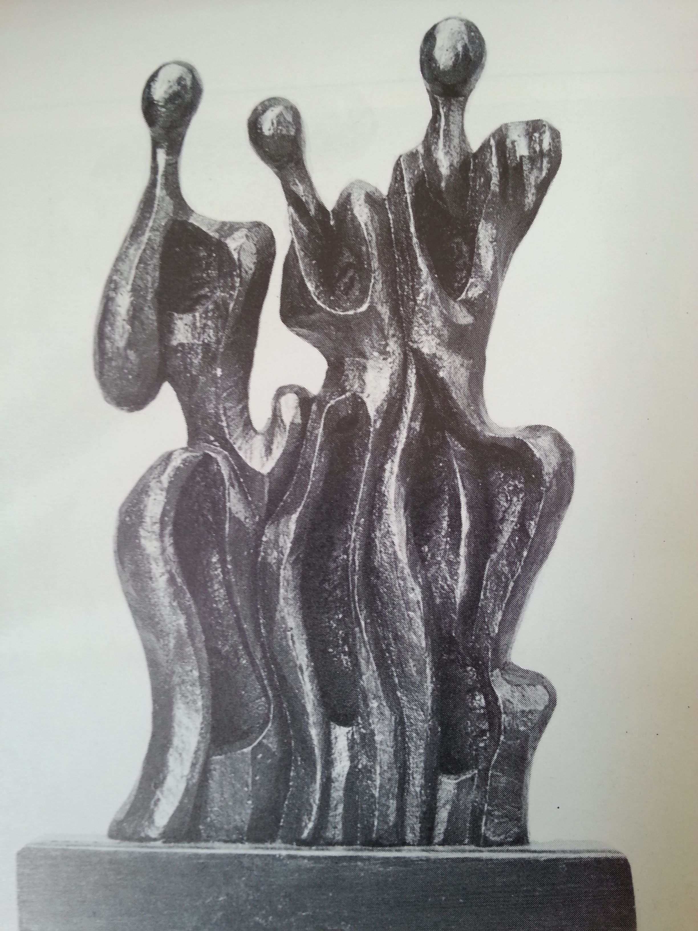 (פליז; יצירת האמן בנימין גליקמן (ב. גליקמן